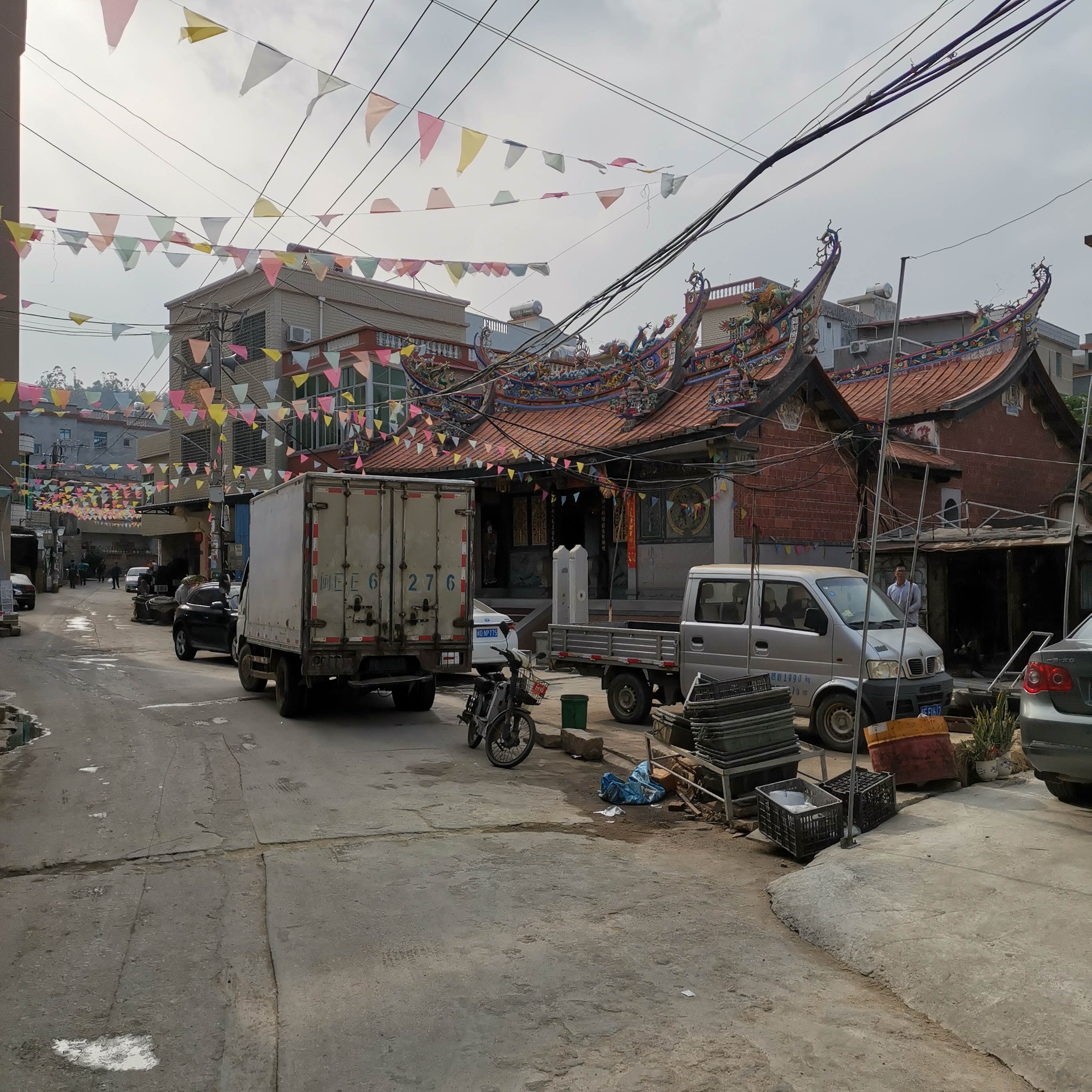 中文（中国大陆）: 港尾镇石埠村